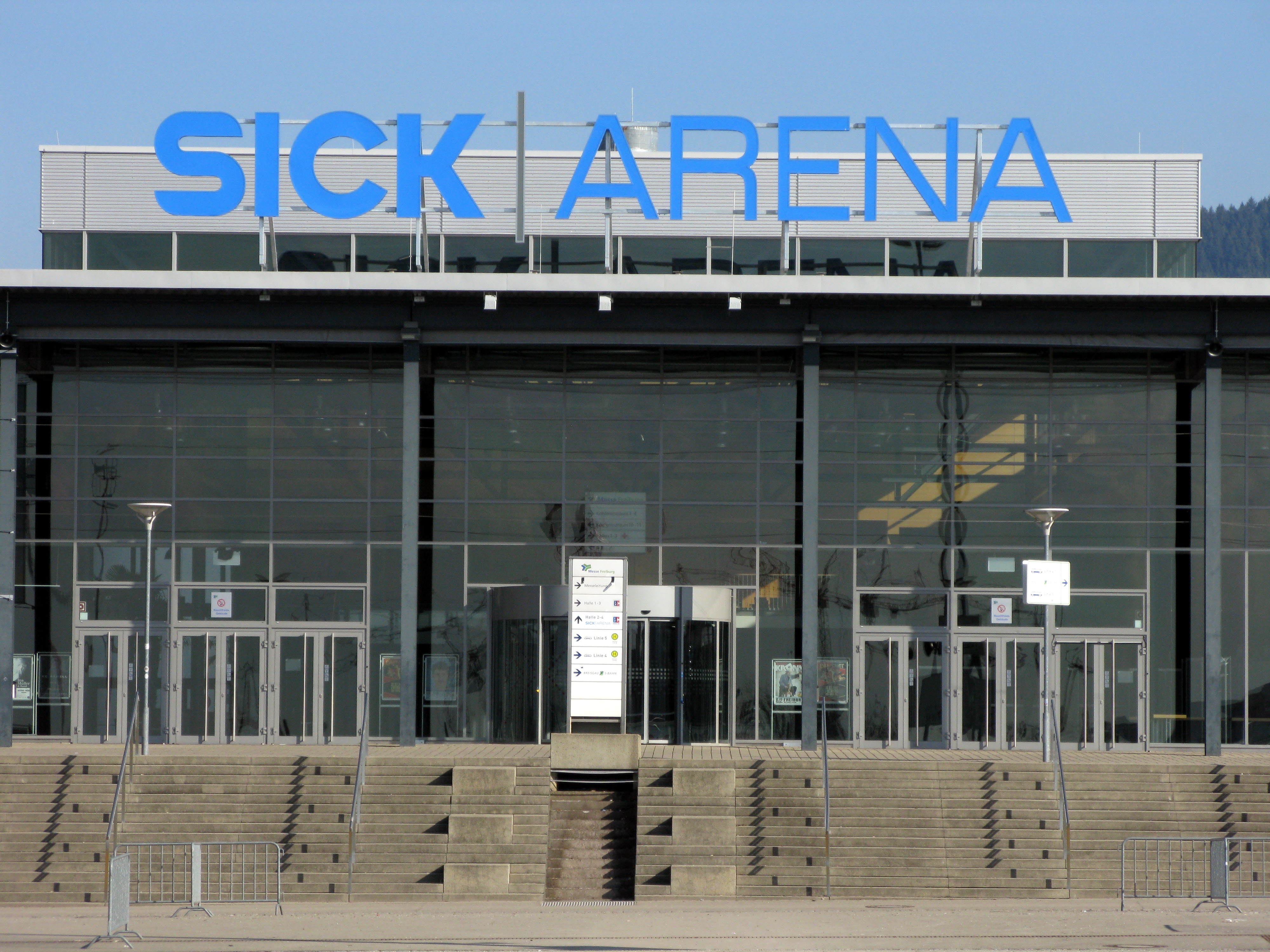 Sick-Arena (bis 2016 Rothaus-Arena) auf der Messe Freiburg